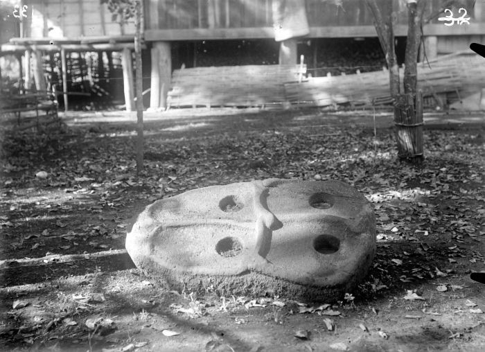 Negatief. Megalitische vijzel in Padjarboelan